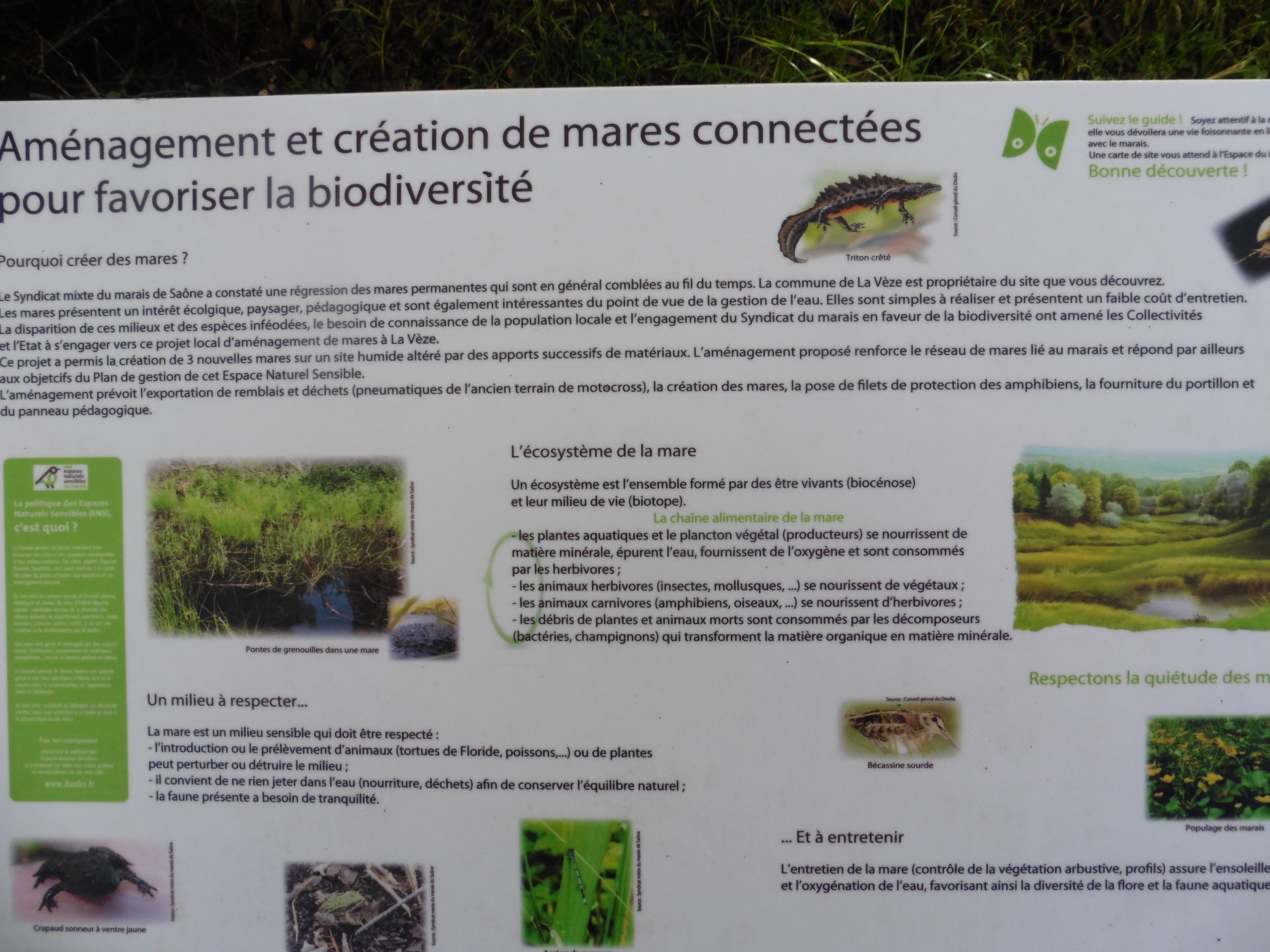 Panonceau informatif